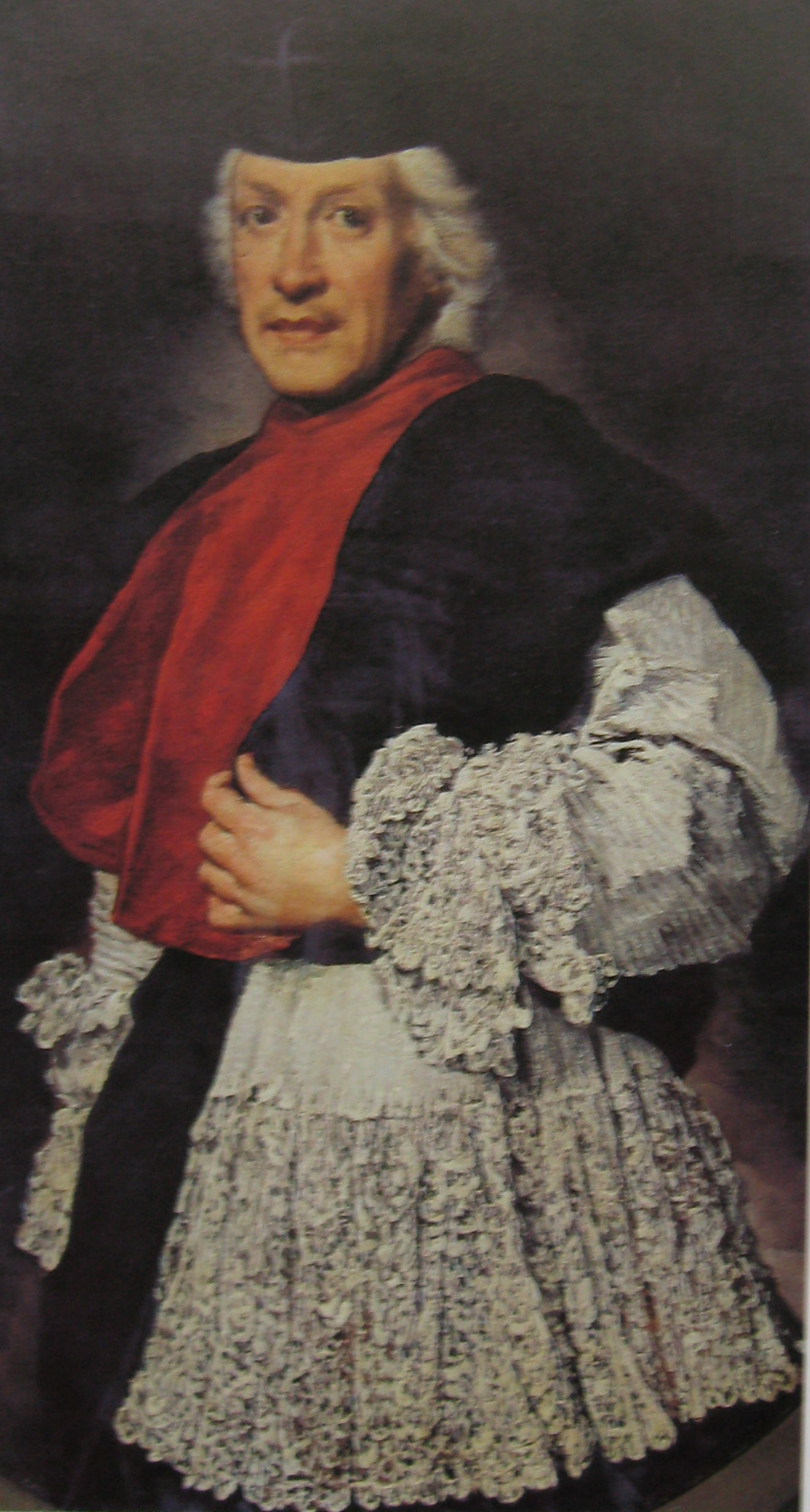 detail